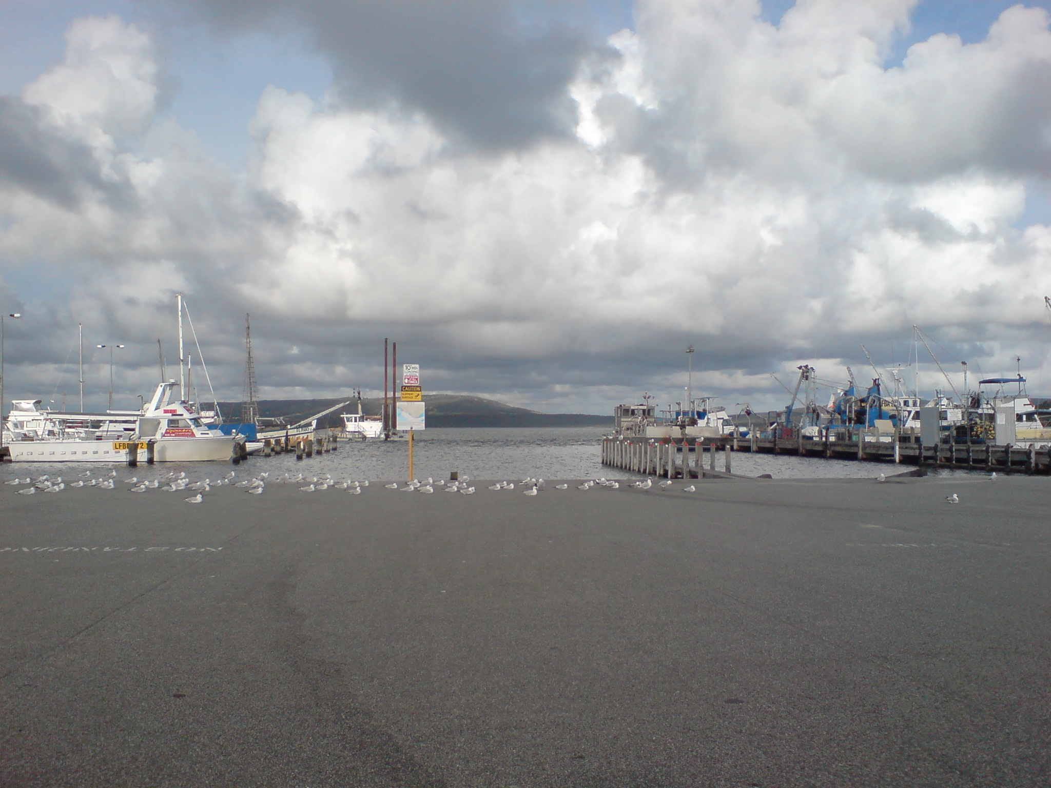 Photo at Emu Point, Albany